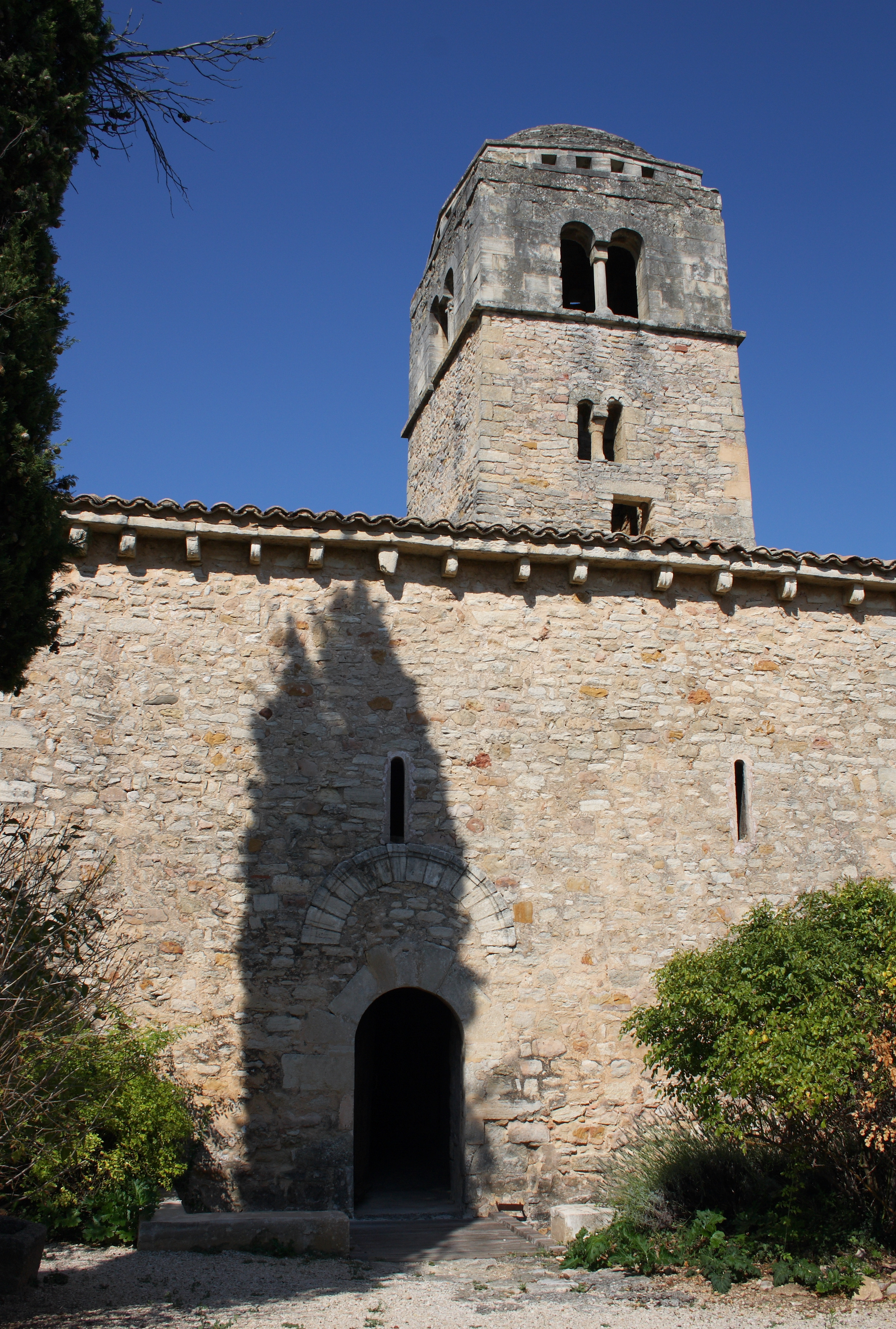 Romanische Kapelle Sainte-Madeleine in Bédoin, einer Gemeinde im Département Vaucluse in der französischen Region Provence-Alpes-Côte d’Azur, Ansicht von Süden